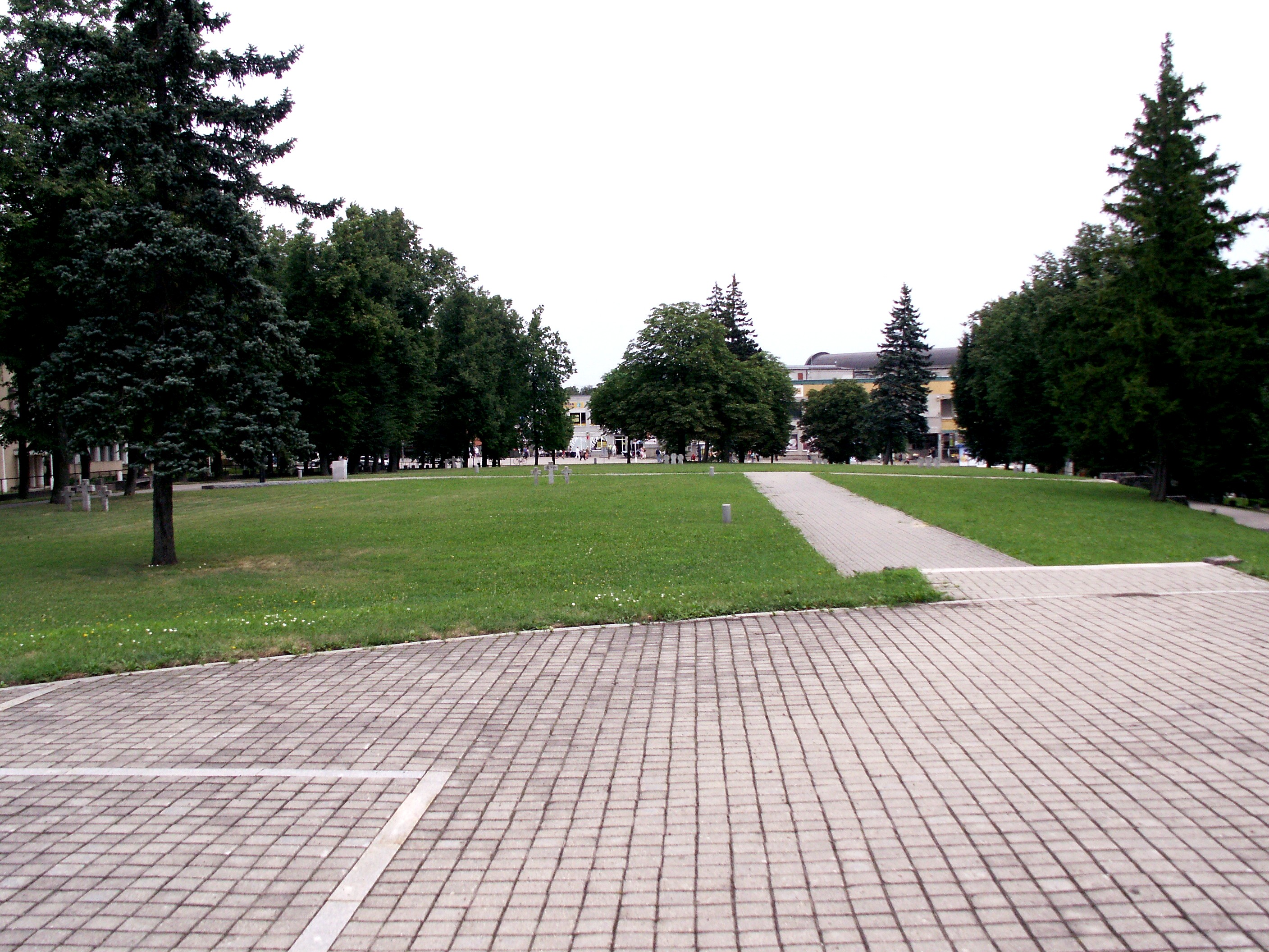 Kriegsgräberstätte Sukilėlių kalnelis, Šiauliai